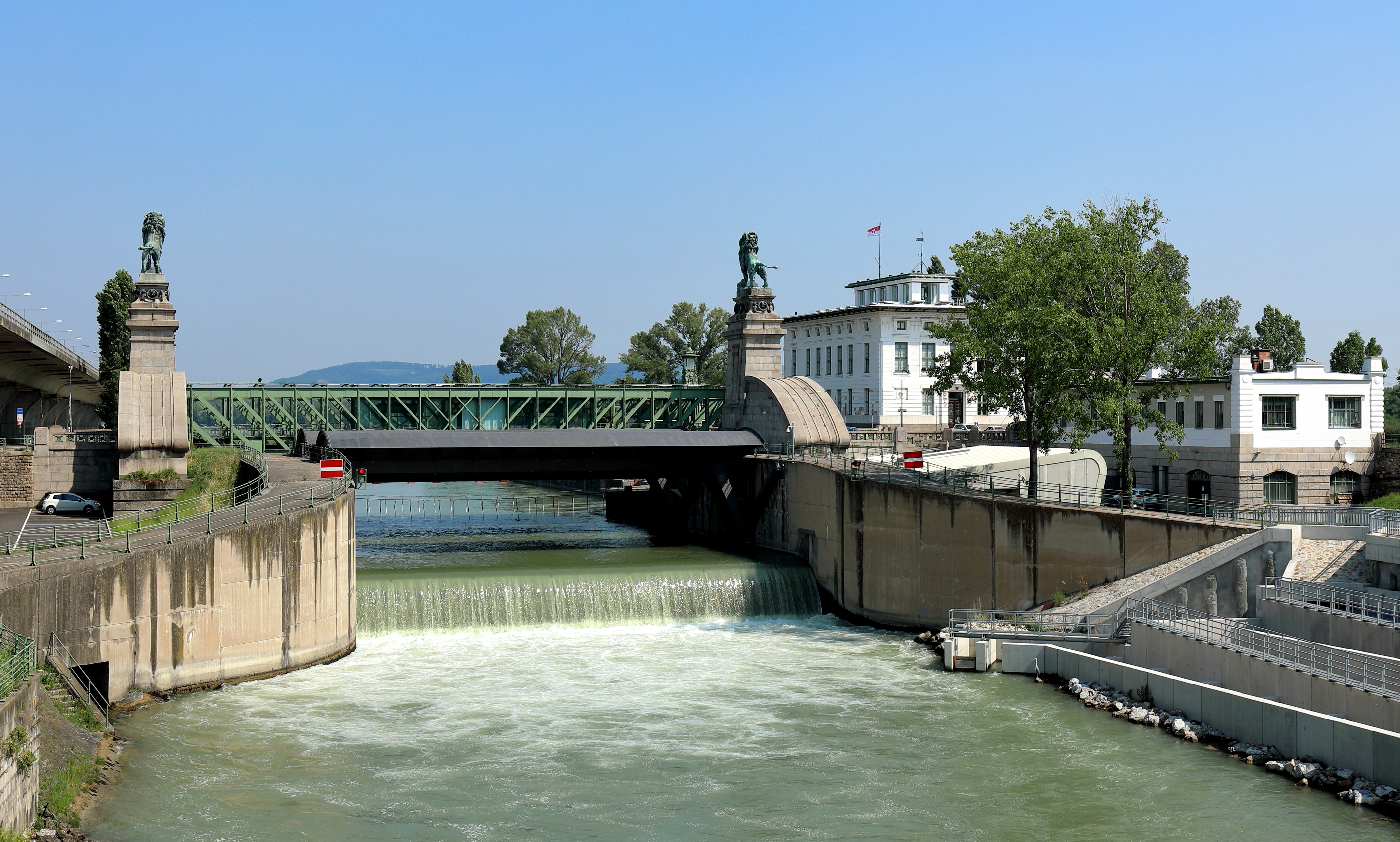 Die Nussdorfer Wehranlage an der Grenze zwischen dem 20. Wiener Gemeindebezirk Brigittenau und dem 19. Gemeindebezirk Döbling.Die Wehranlage wurde von Otto Wagner entworfen und von 1894 bis 1898 errichtet. Sie besteht aus der eigentlichen Wehr, die mehrfach umgebaut wurde, der Schemerlbrücke, dem Verwaltungsgebäude für die „Donau-Regulierungs-Commission“ und dem sogenannten „Kettenmagazin-Gebäude“ (ganz rechts). 2004/2005 wurde ein Kleinkraftwerk mit 12 Matrix-Turbinen in die Wehr eingebaut (das Technikgebäude tw. sichtbar vor dem Verwaltungsgebäude). Ganz rechts eine Fischwanderhilfe, die 2017 eröffnet wurde, und ganz links die Hochtrasse der Klosterneuburger Straße (B14), die von 1981 bis 1983 von der Baufirma H. Rella & Co. errichtet wurde.